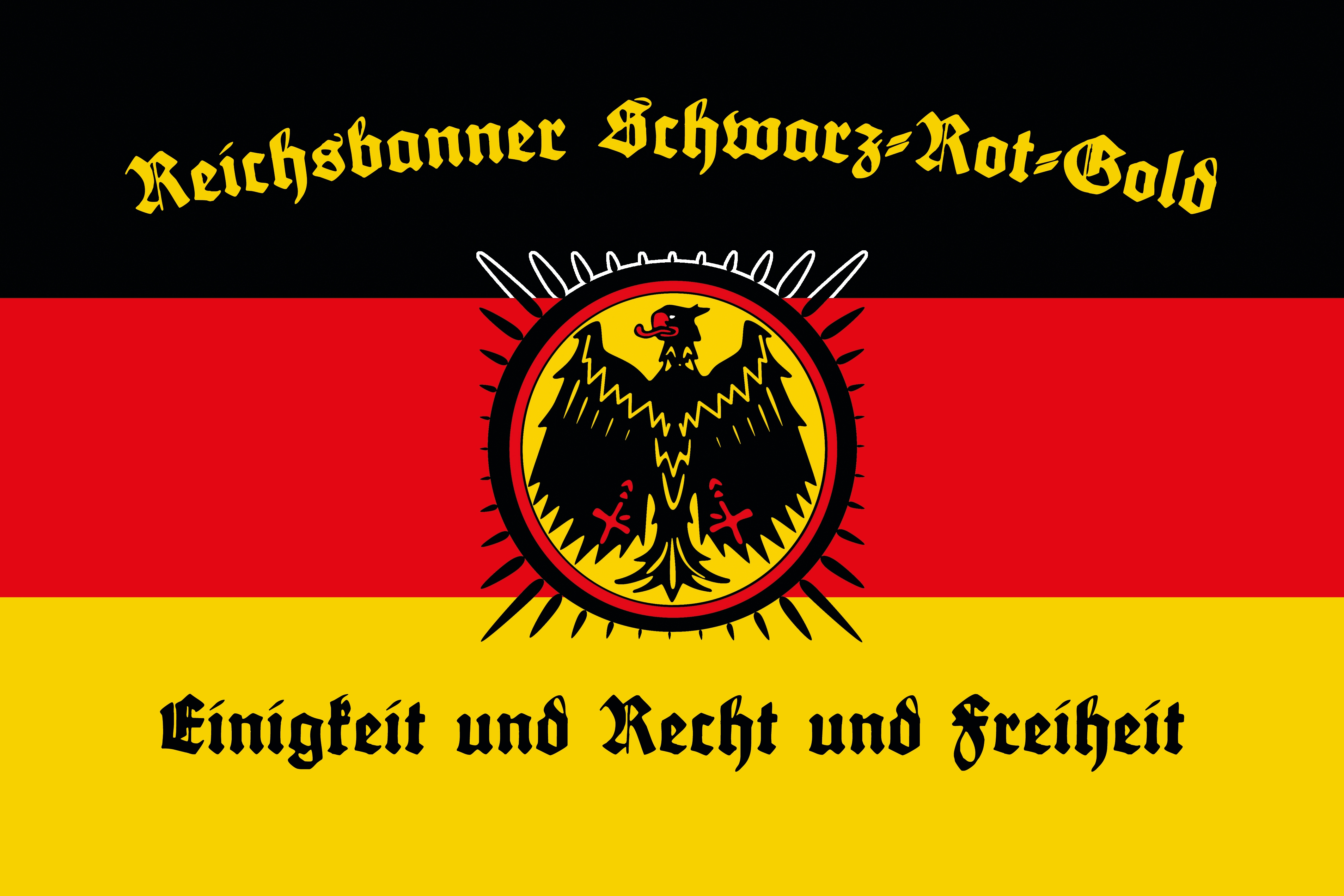 Flagge des Reichsbanners Schwarz-Rot-Gold, Bund aktiver Demokraten.